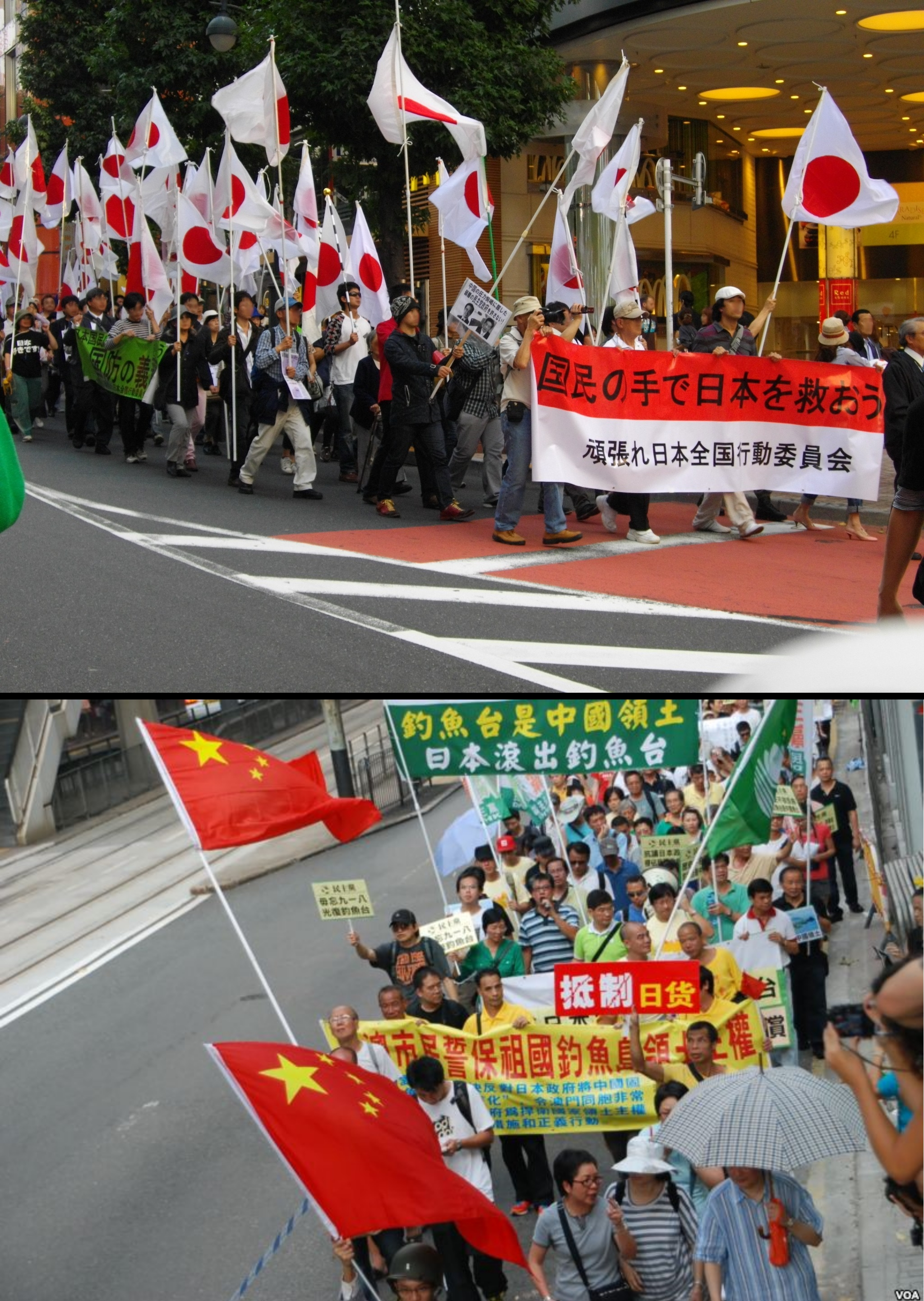 "Collage" de dos fotos sobre las protestas de 2012 por el tema de las Islas Senkaku (o Islas Daiyou). La superior muestra una marcha japonesa de los nacionalistas e este país para apoyar la pretensión de su gobierno frente a los intereses de China. La segunda muestra una marcha china como protesta anti-japonesa en Agosto de 2012.